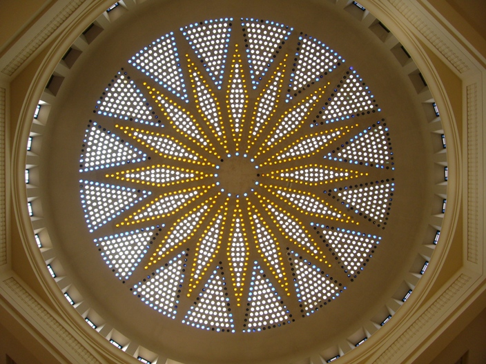 Bibliothèque d'Etude et du Patrimoine, Toulouse.